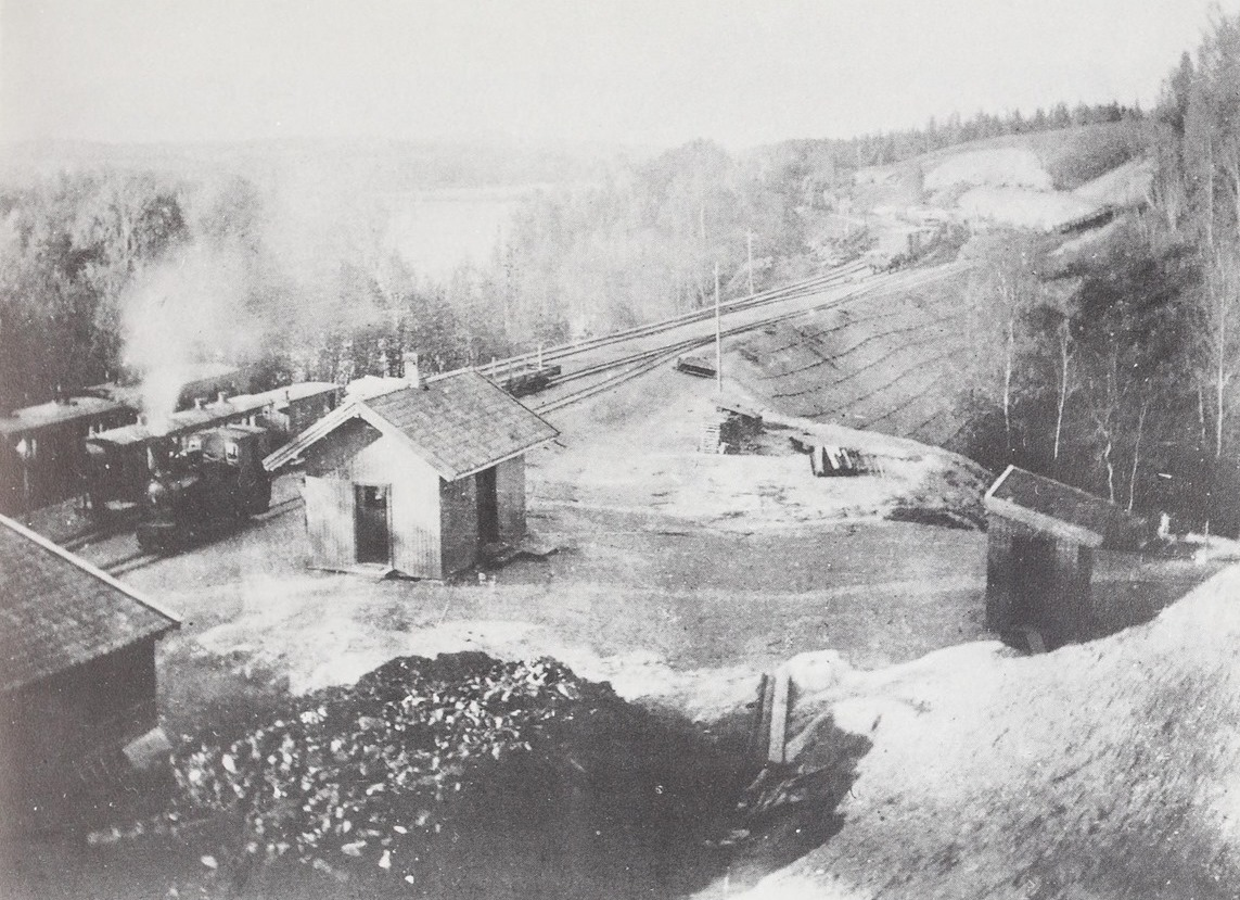 Bingsfos stasjon i 1897. Foto: Anders Johnsen. Gjengitt i boken «Banen og bygda: Tertitten gjennom hundre år».